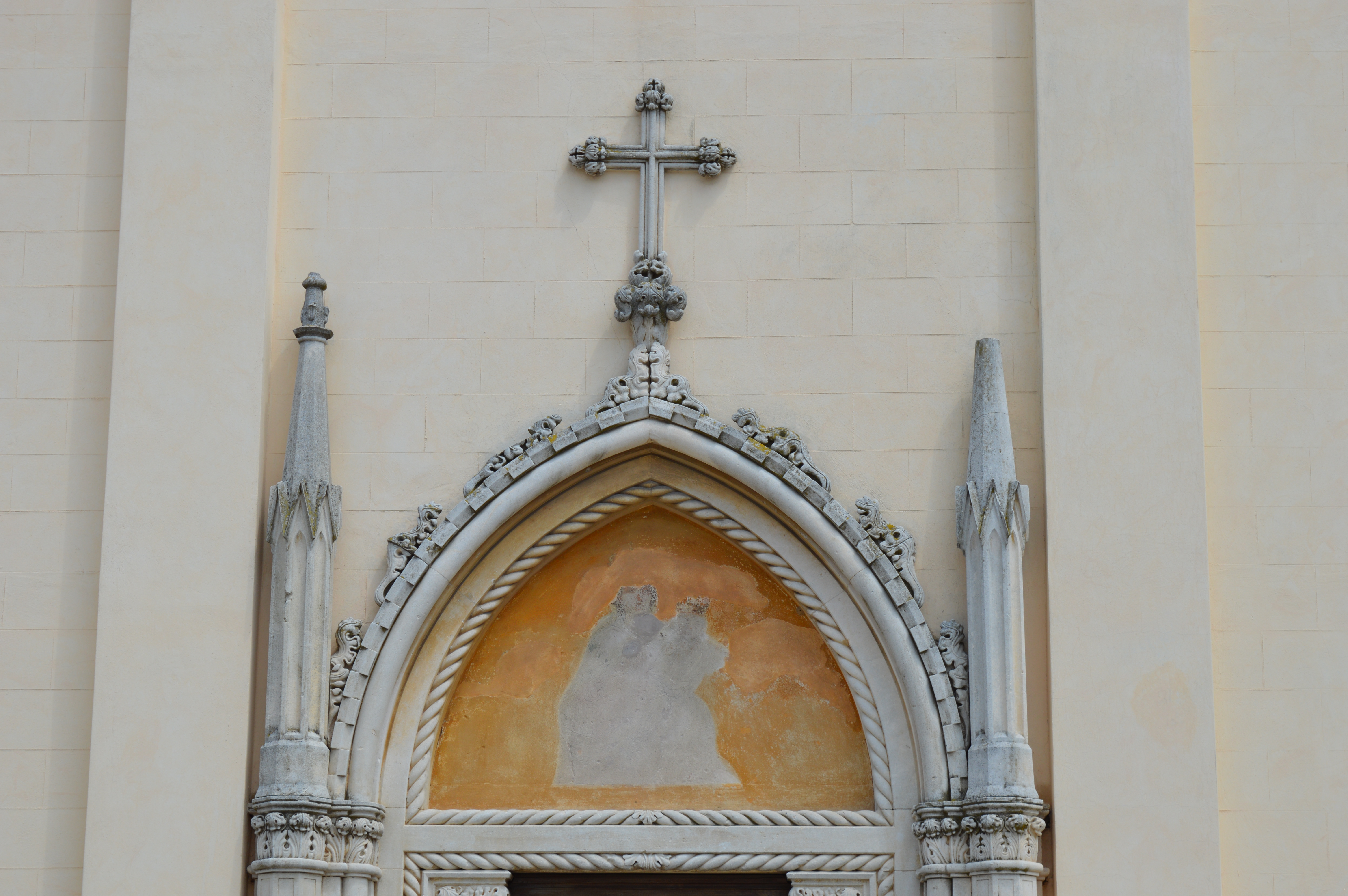 Timpano della porta principale della chiesa longobarda di San Giorgio Martire a Costabissara, in provincia di Vicenza.